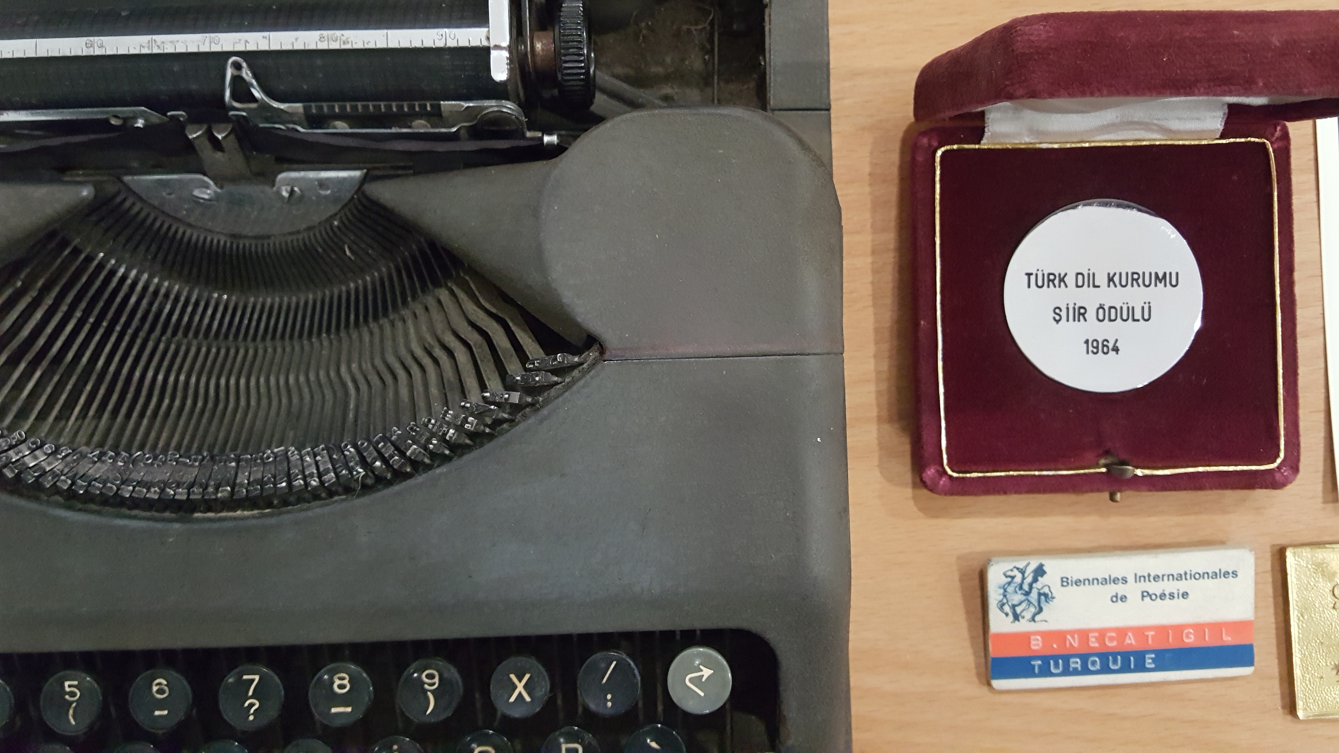 Behçet Necatigil'in daktilosu ve Türk Dil Kurumu Şiir Ödülü